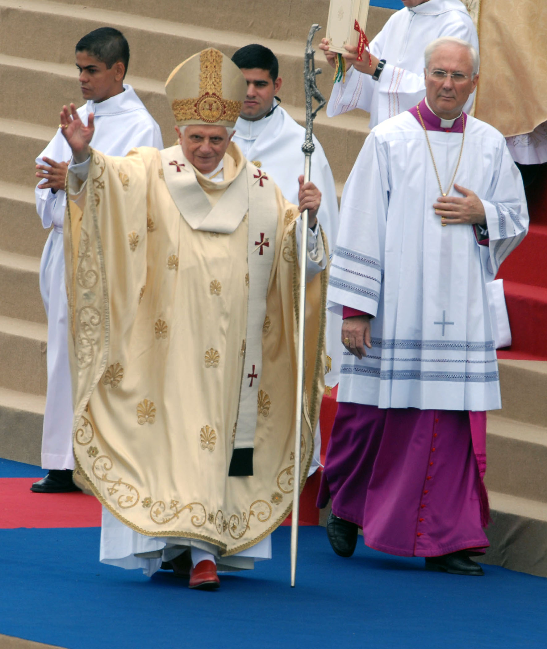 Papa Bento XVI durante missa na Basílica de Nossa Senhora Aparecida, no interior do estado de São Paulo, Brasil.